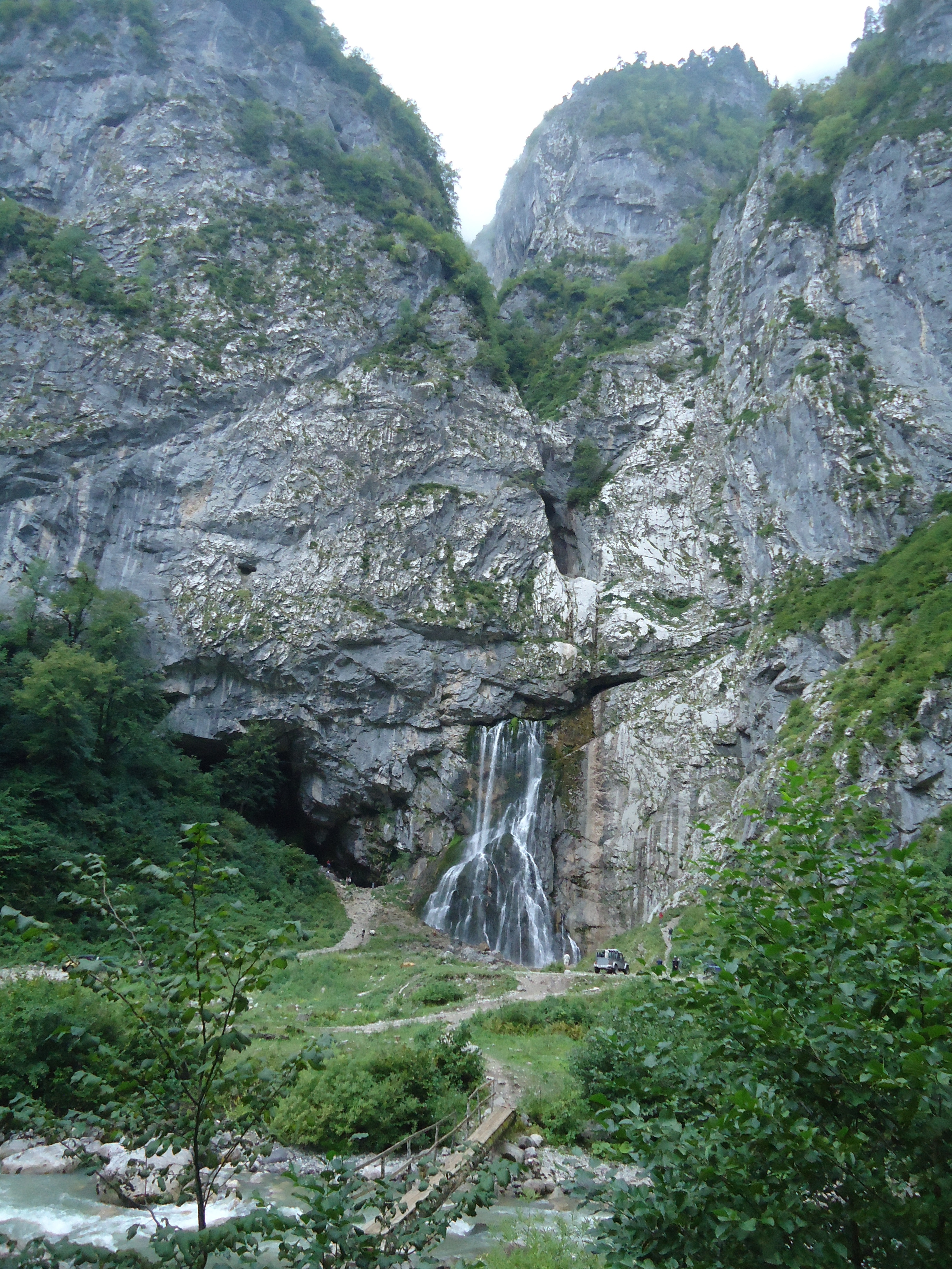 Гегский (Черкесский) водопад в Абхазии